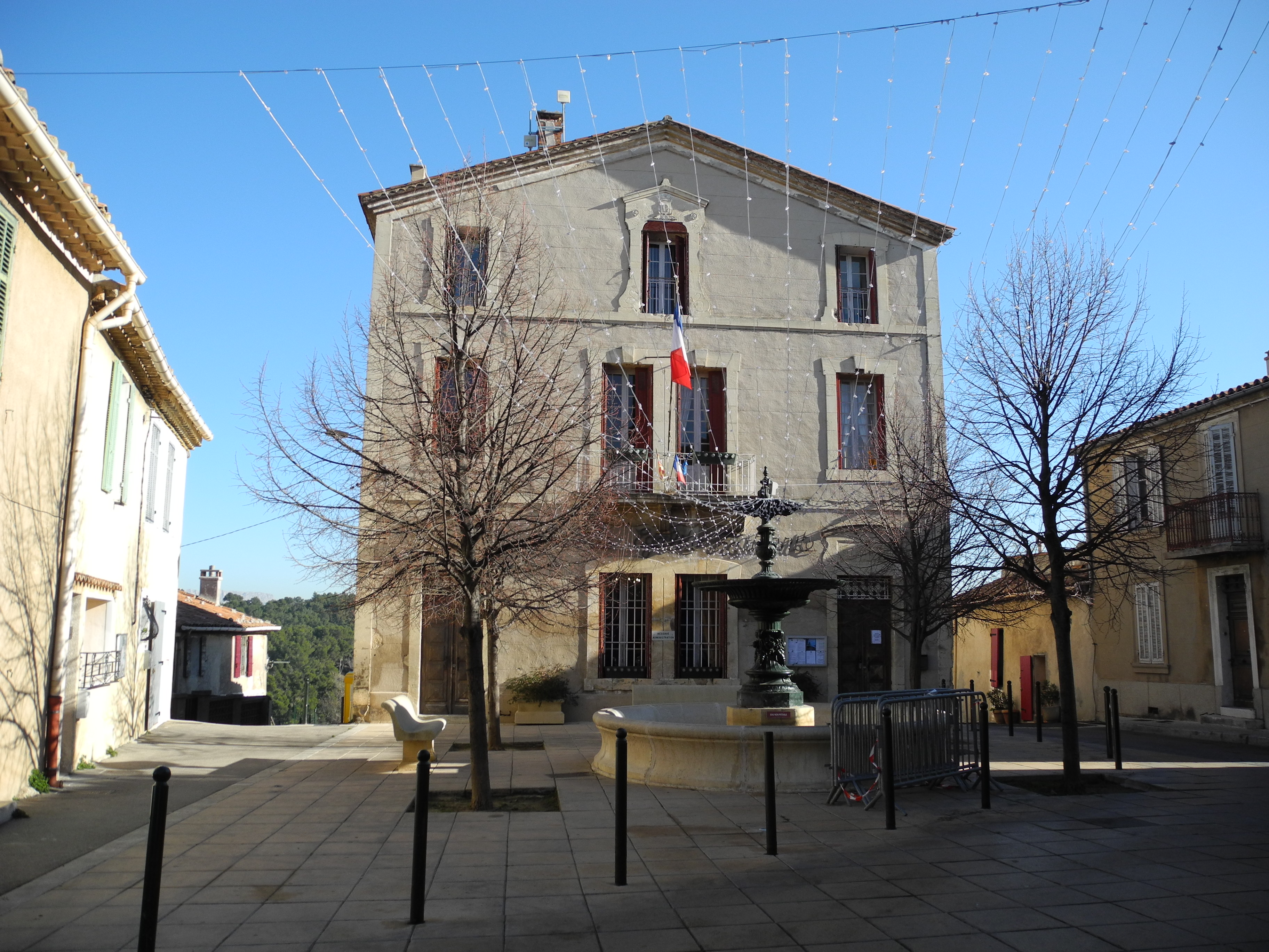 Mairie de Cabriès dans les Bouches-du-Rhône